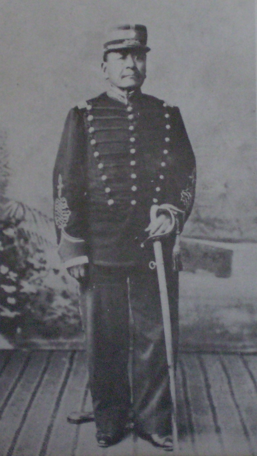 Cacique Namuncurá, hijo de Calfucurá, con el uniforme de éjercito argentino